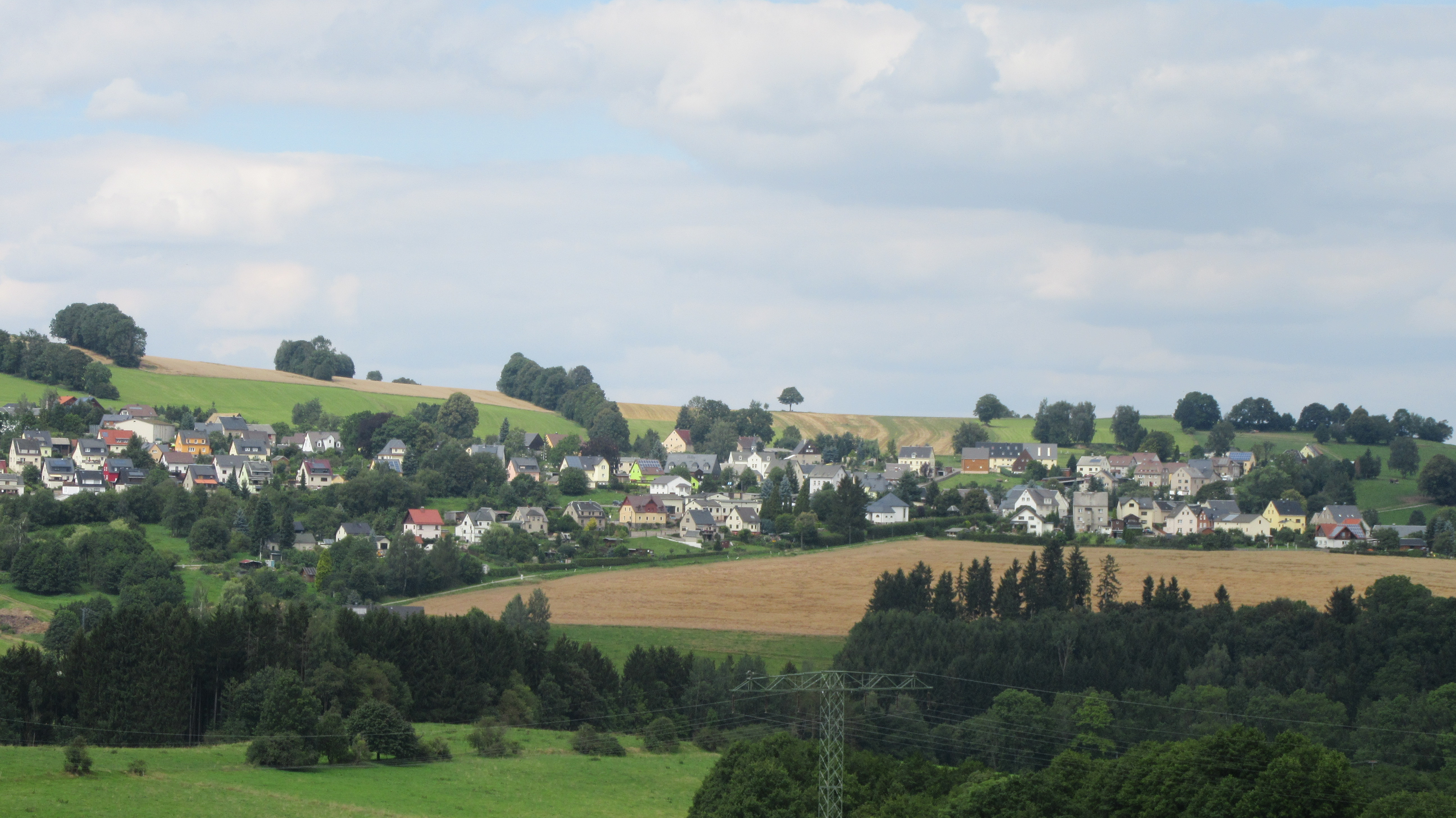 Wünschendorf, von Lengefeld aus gesehen